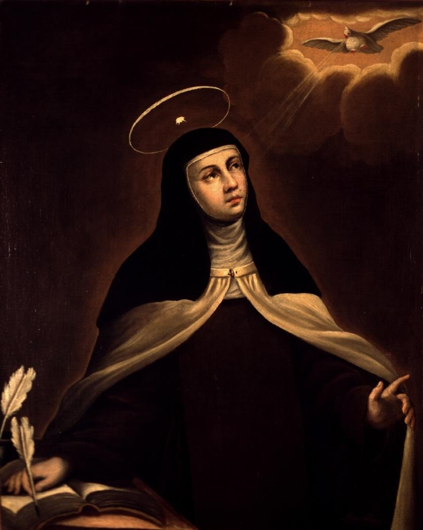 La obra representa a la mística española Santa Teresa de Jesús (1515-1582).